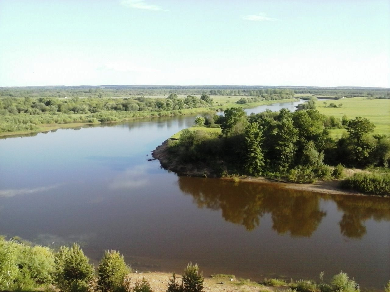 Вид на реку Чепцу с Красной горки возле дома отдыха "Чепца", Глазовский район Удмуртии